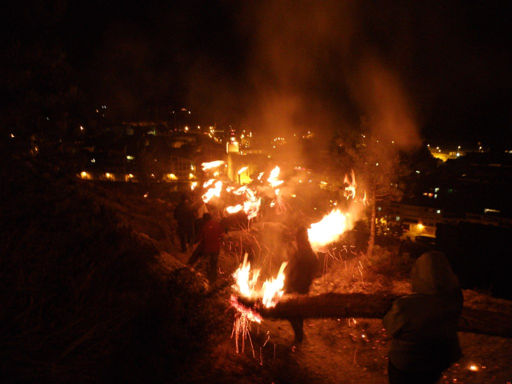 El Paisatge sonor de la Fia-faia és un recull dels ambients sonors d'aquesta festa ancestral que té lloc a Bagà i Sant Julià de Cerdanyola coincidint amb el solstici d'hivern. La Fia-faia és el que queda d'un antic ritual de culte el sol que amb la cristianització s'integrà a la festa de Nadal. Avui és una festa en plena recuperació que guanya cada any intensitat i dinamisme. El foc és l'element més característic. Però les seves sonoritats no acaben amb el crepitar de les faies (falles). El Paisatge ens ofereix també el repic de campanes del Toc d'oració, el so del corn des del Siti, el fregar de l'herba seca en el sòcol de pedres, diversos passejos sonors al ritme dels faiaires, les músiques o els balls. El Paisatge està format per un total de 30 sons enregistrats el 24 de desembre de 2008. Amb el recull dels diversos moments de la celebració, ens obre una nova manera de percebre el patrimoni.